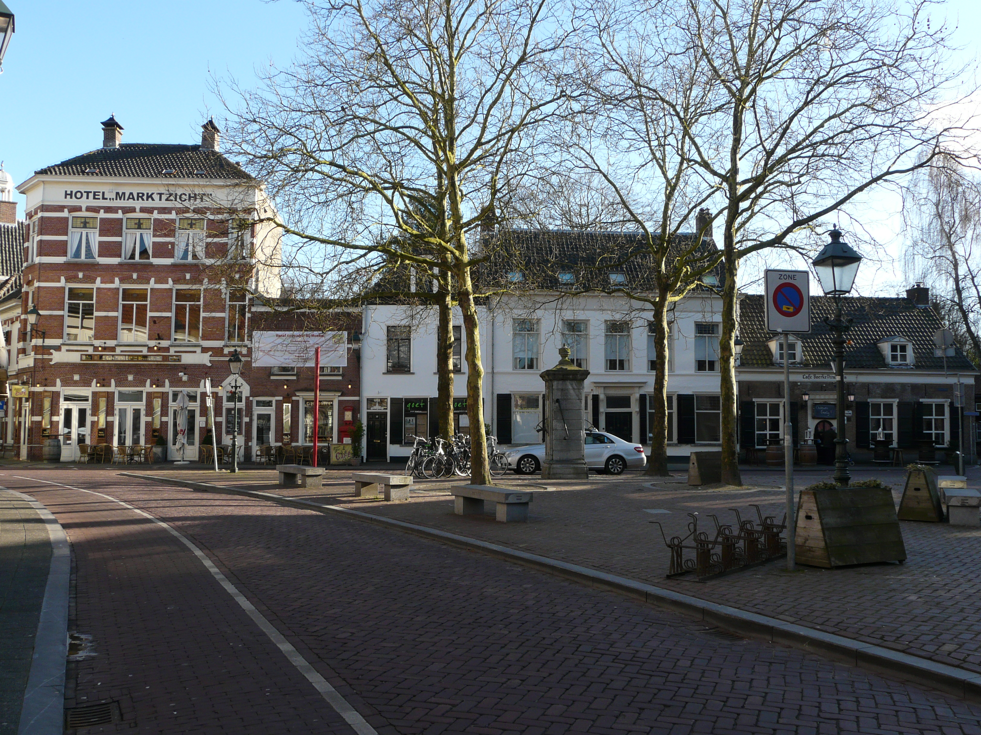 Zicht op deel van de Ginnekenmarkt in het Ginneken. Gelegen in het zuiden van Breda